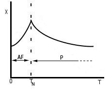 Antiferromagneetiku magnetilise vastuvõtlikkuse sõltuvus temperatuurist